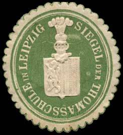 Sealing stamp Title: Siegel der Thomasschule in Leipzig Description: grün, weiß, geprägt Place: Leipzig size: 4x3 cm